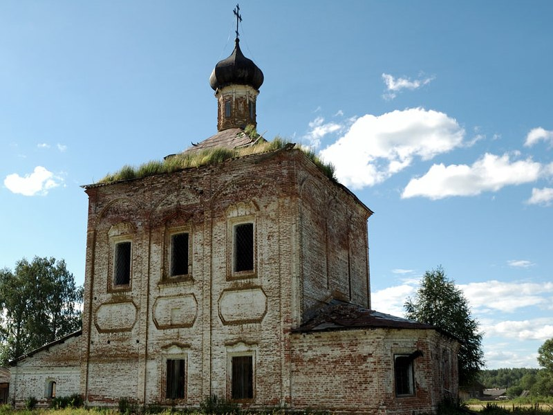 Сойгинская пустынь, Ленский район, Архангельская область